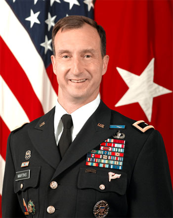 Brigadier General Mark S. Martins